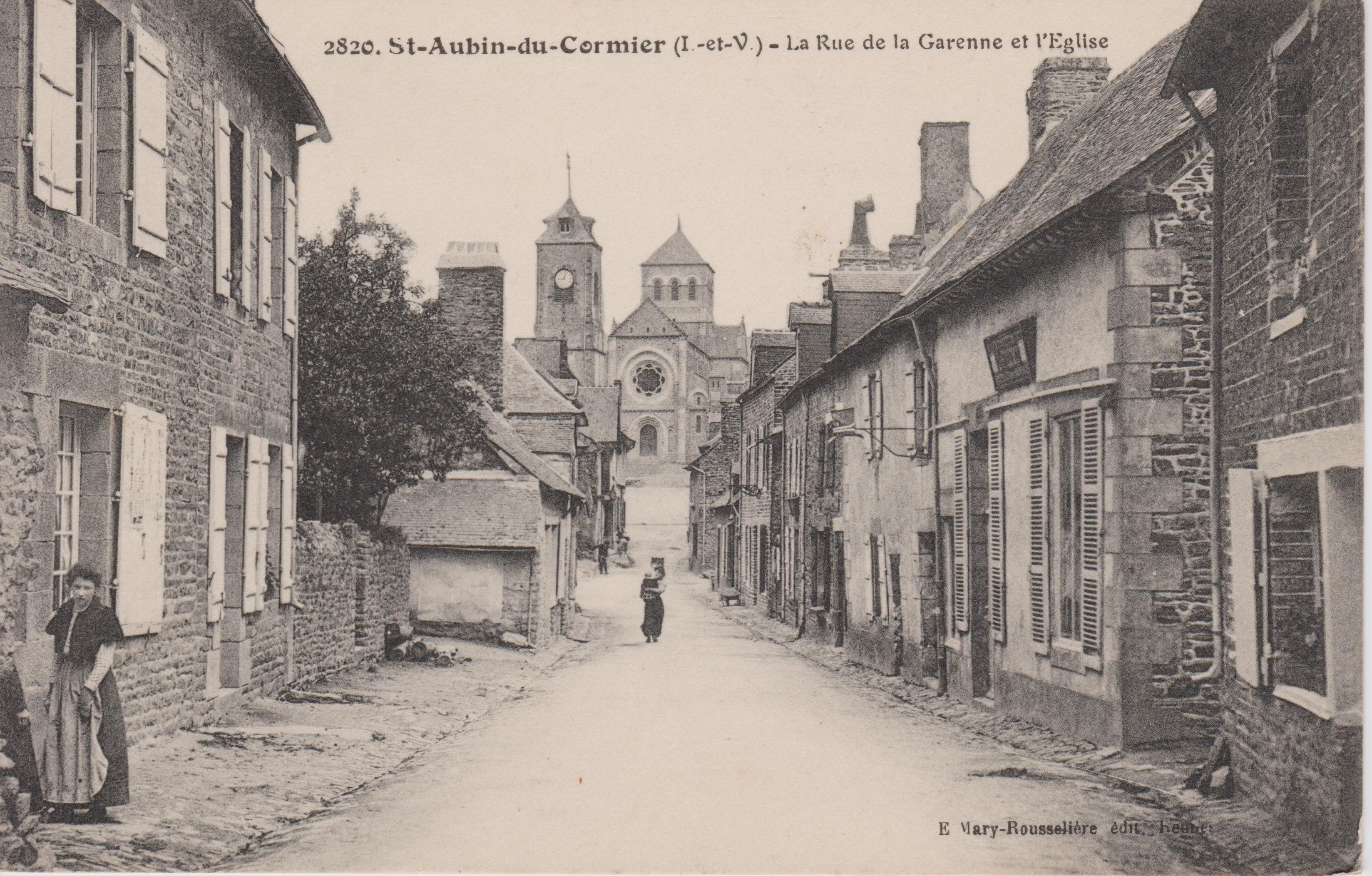 La Rue de la Garenne et l'église à Saint-Aubin-du-Cormier au début du XXème siècle